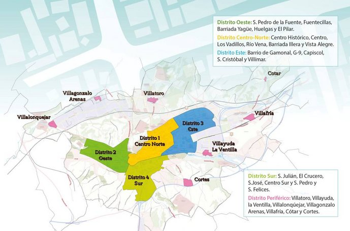 Mapa de distritos de la ciudad de Burgos aprobado en el año 2016